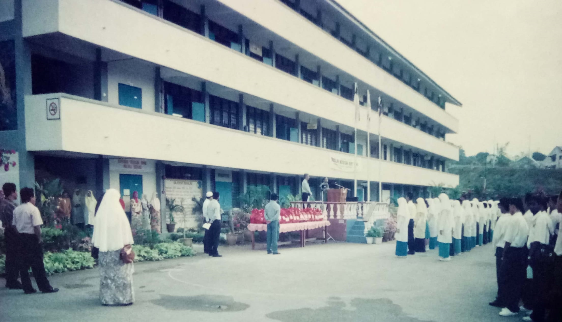 Bangunan Sekolah SMKBB tahun 90an